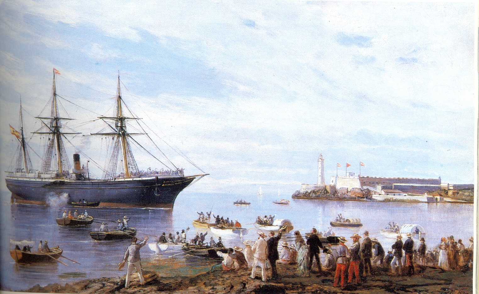 El Correo entrando en el puerto de La Habana